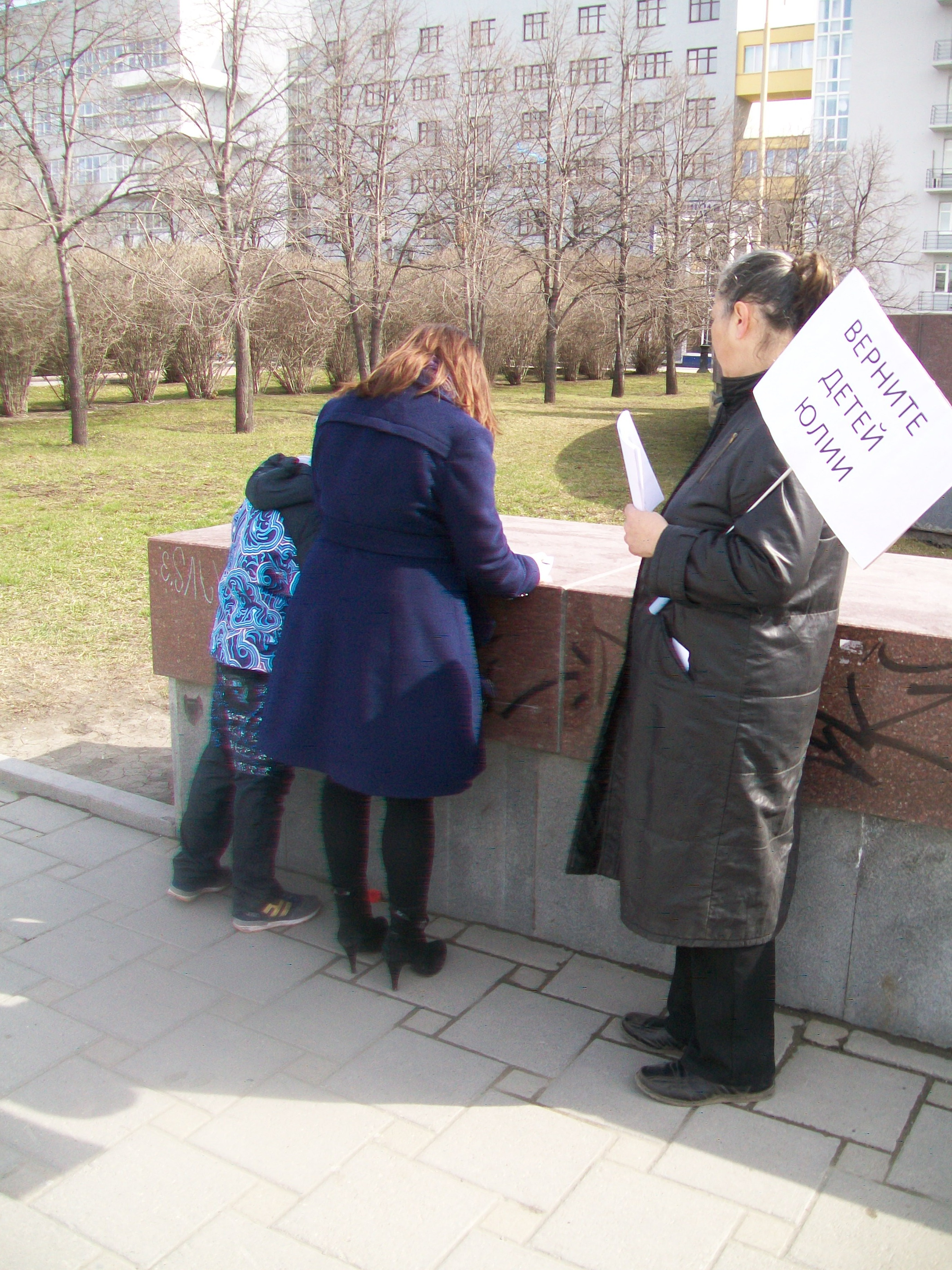 Сбор подписей за возврат детей Юлии Савиновских в Екатеринбурге